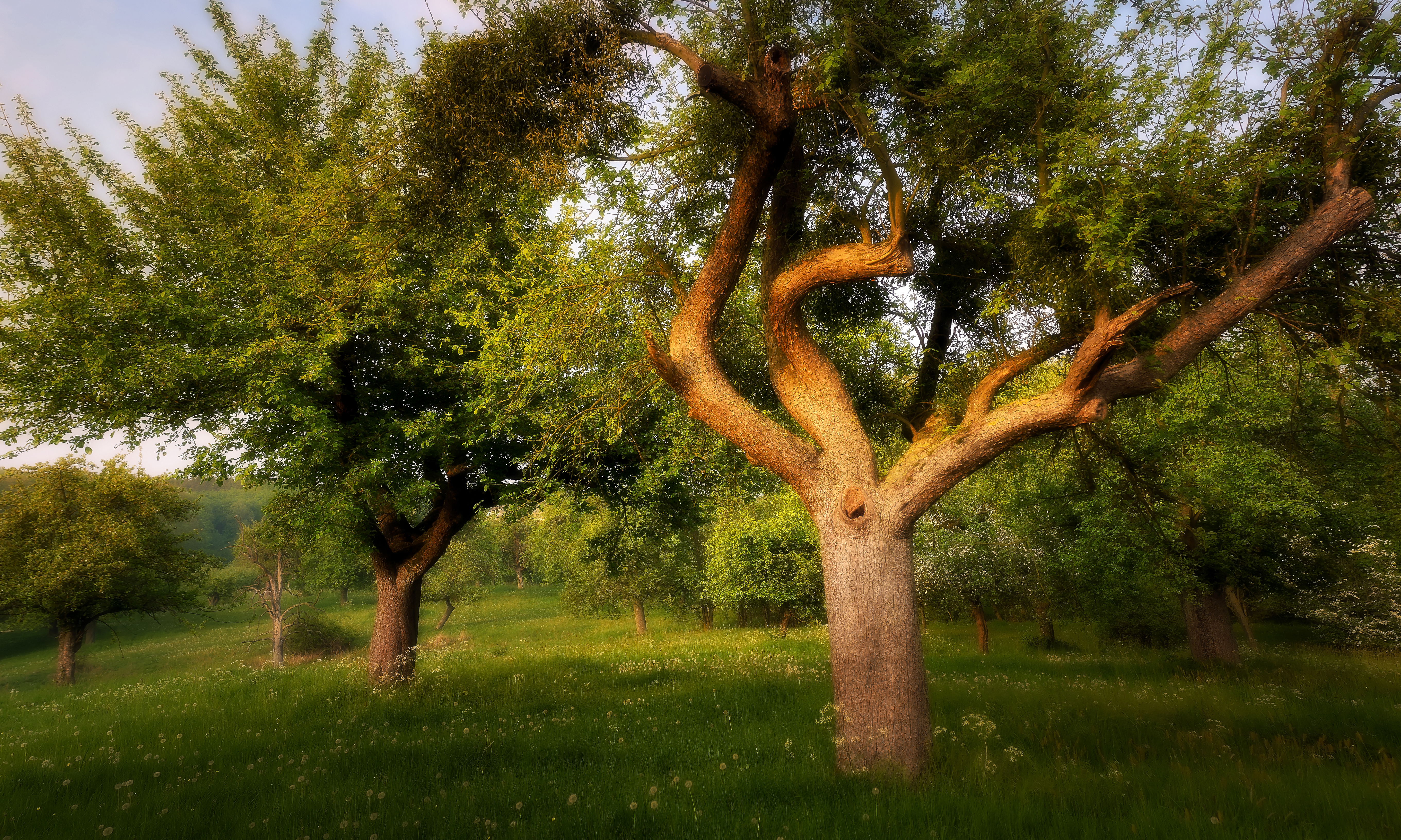 hoogstam in de avondzon